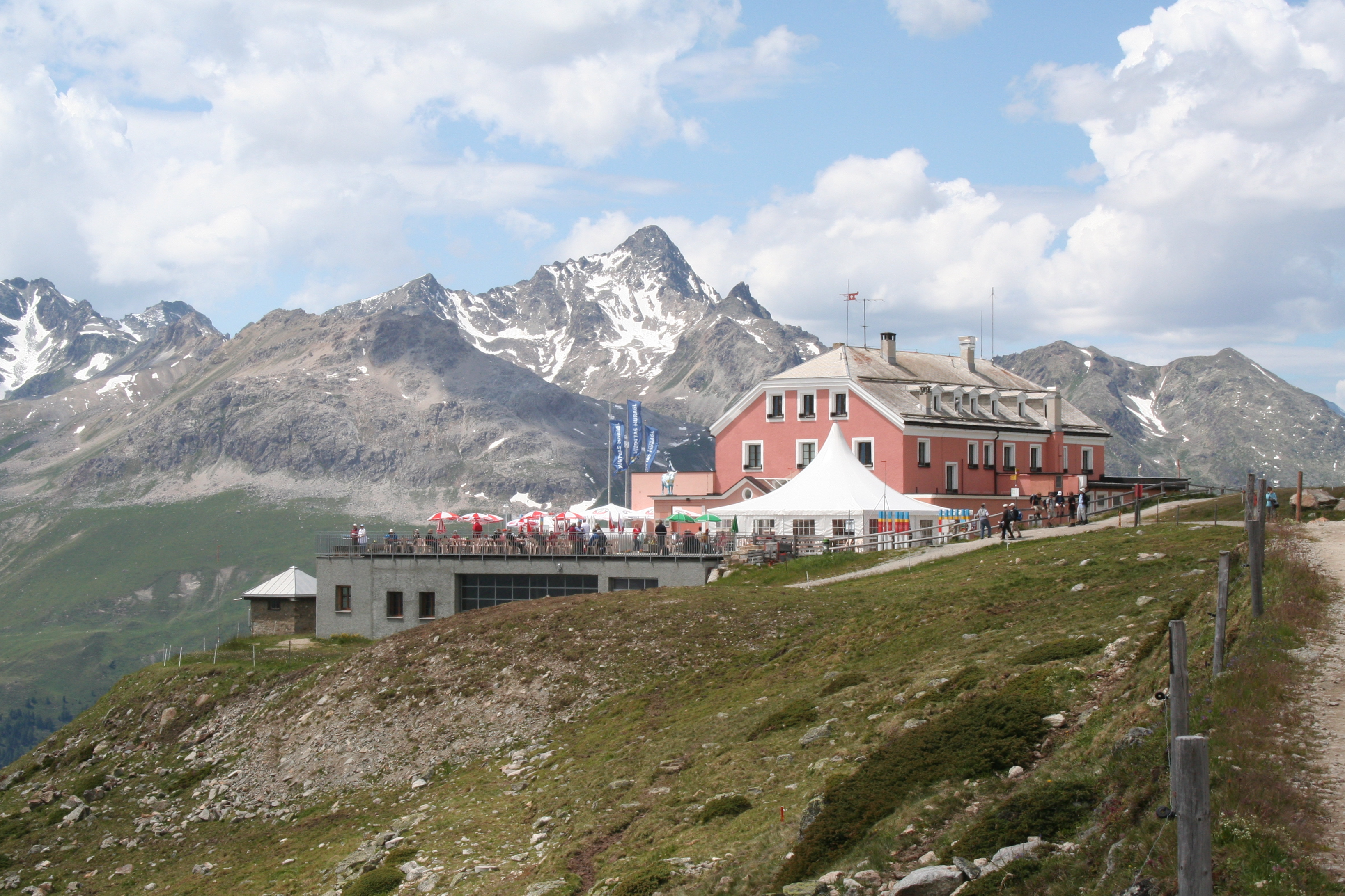 Muottas Muragl Ansicht von Süden